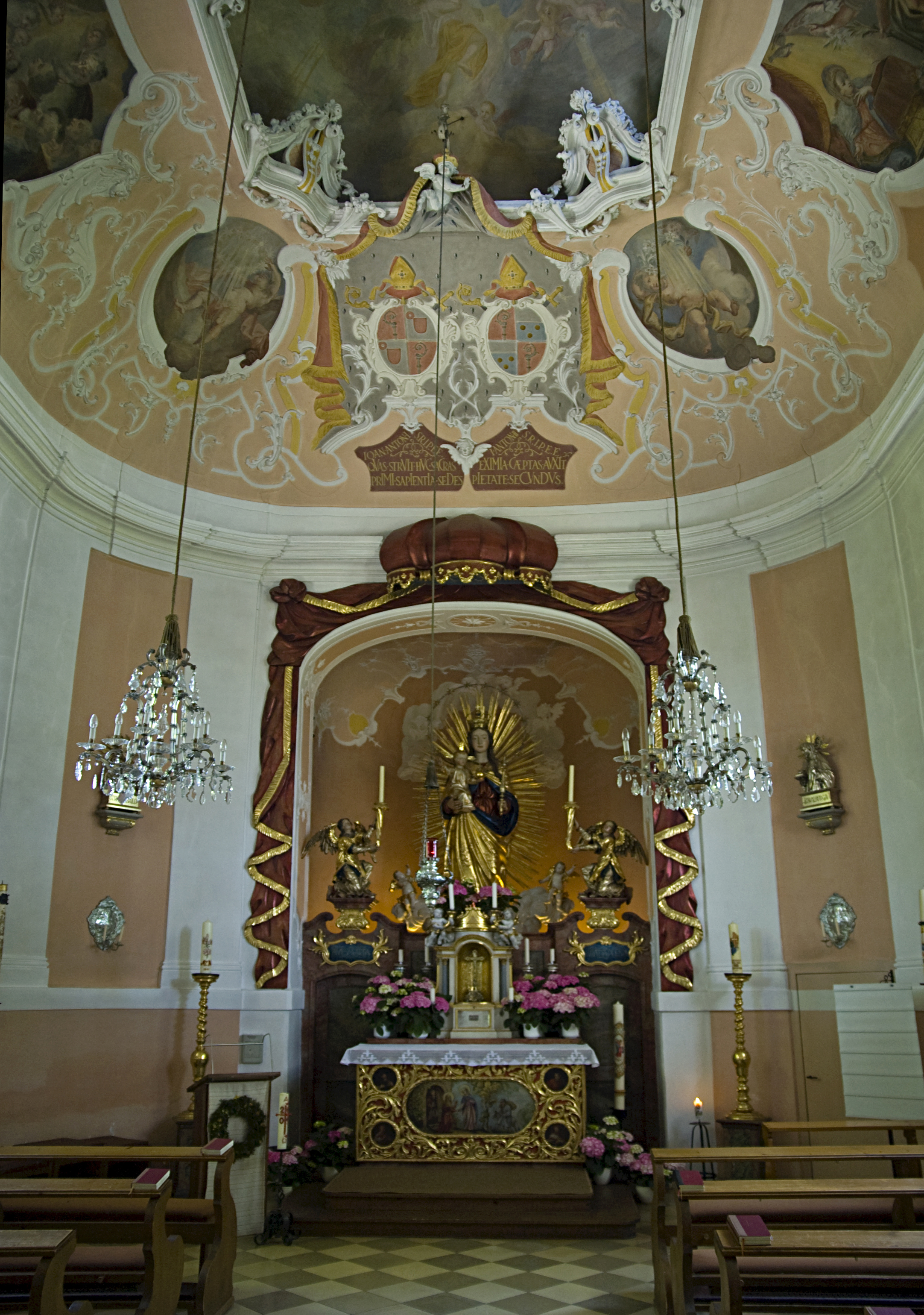 Frauenbergkapelle Der Zentralbau der Marienkapelle auf dem Frauenberg wurde 1739 von Gabriel de Gabrieli vollendet. Vom Frauenberg hat man einen wunderschönen Ausblick auf Eichstätt und Rebdorf. Die Ausstattung und das Marienbild stammen aus dem 18. Jahrhundert.This is a photograph of an architectural monument.